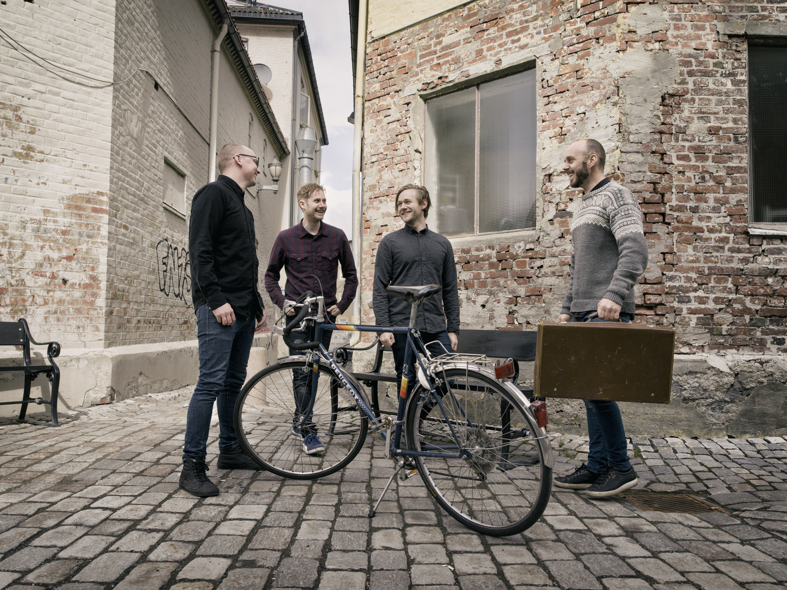 Mandarinsaft band